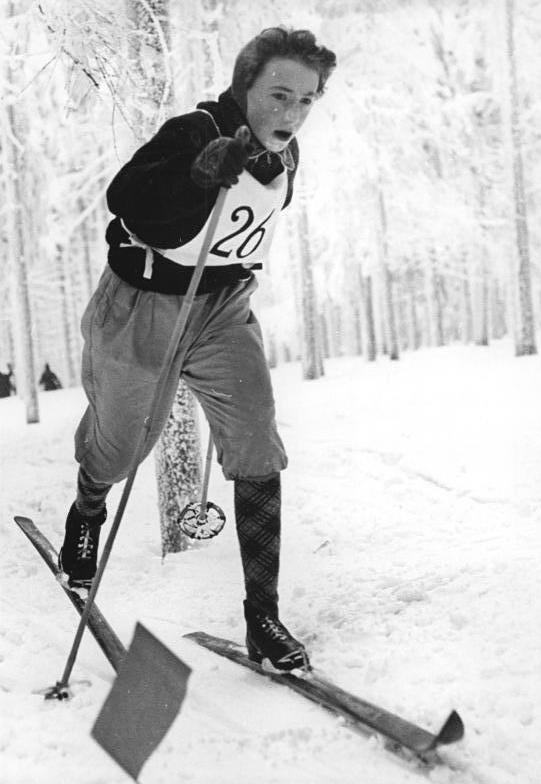 Zentralbild Wlocka 12.2.56 Jugend-Meisterschaften der Deutschen Demokratischen Republik in den Nordischen Disziplinen vom 9. bis 12.2.1956 in Oberhof. Der Start zu den Langläufen wurde am Nachmittag des 10.2.1956 gegeben. UBz: Christine Söldner vom SC Traktor, Geyer wurde DDR-Beste der Jugendklasse II